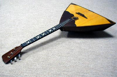 バラライカ(ロシアの弦楽器)投稿者が撮影、撮影時期不明